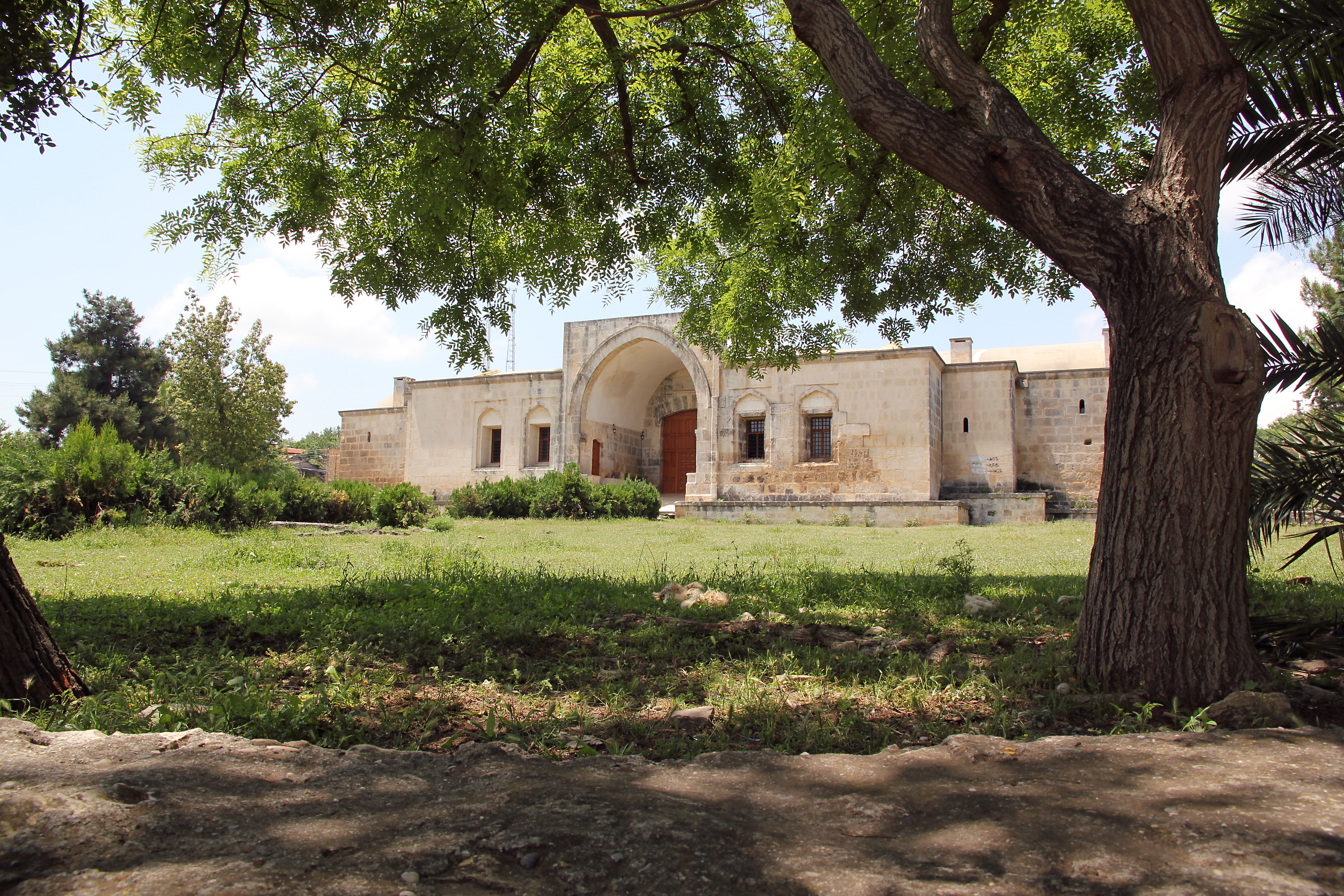 Kurtkulağı Kervansaray im gleichnamigen Ort in der Cukurovaebene, Südtürkei